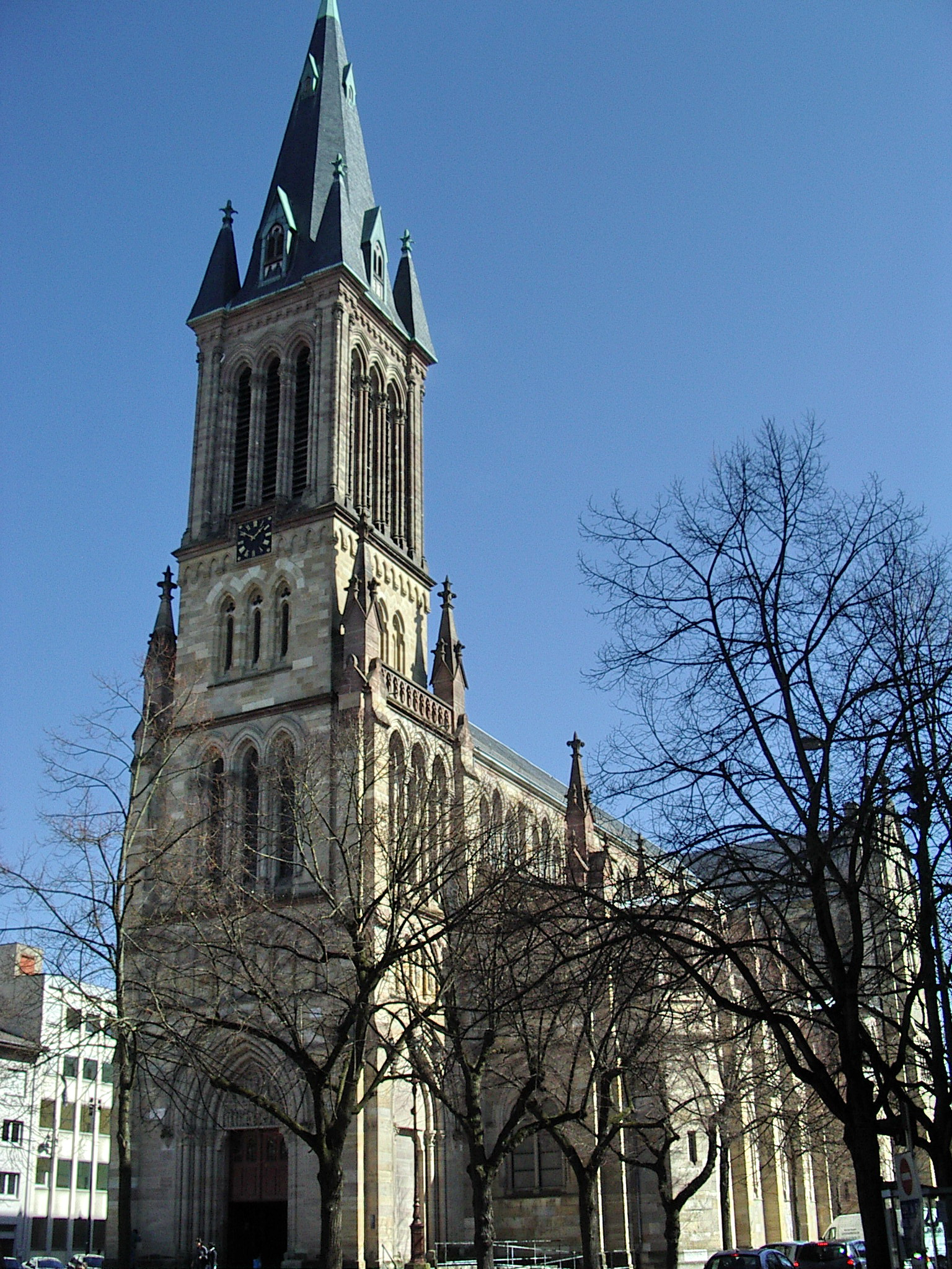 Église Saint-Étienne, Mulhouse, Haut-Rhin, Alsace, France.